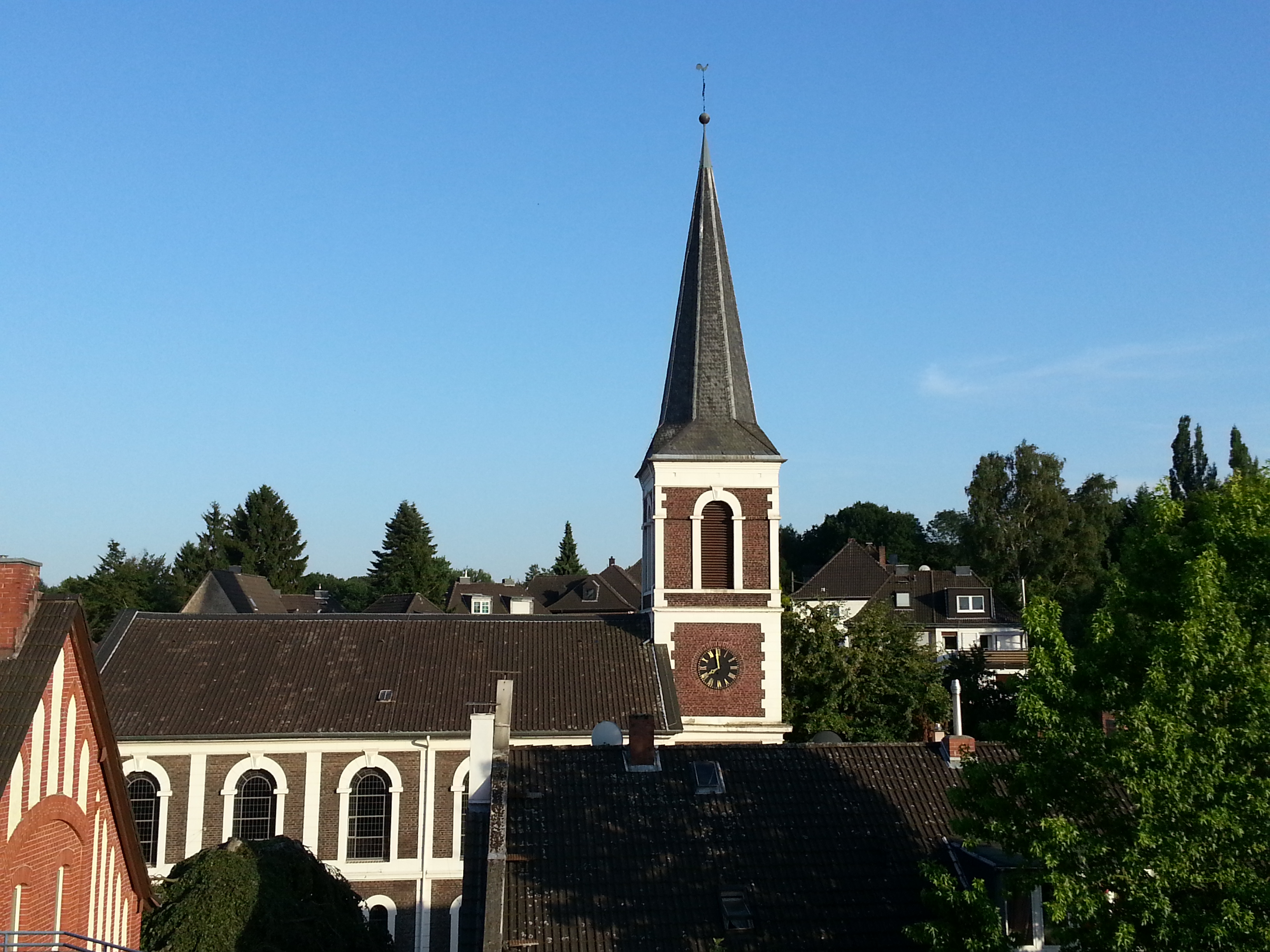 Die evangelische Kirche in Erkrath (Bauzeit 1828-1831)